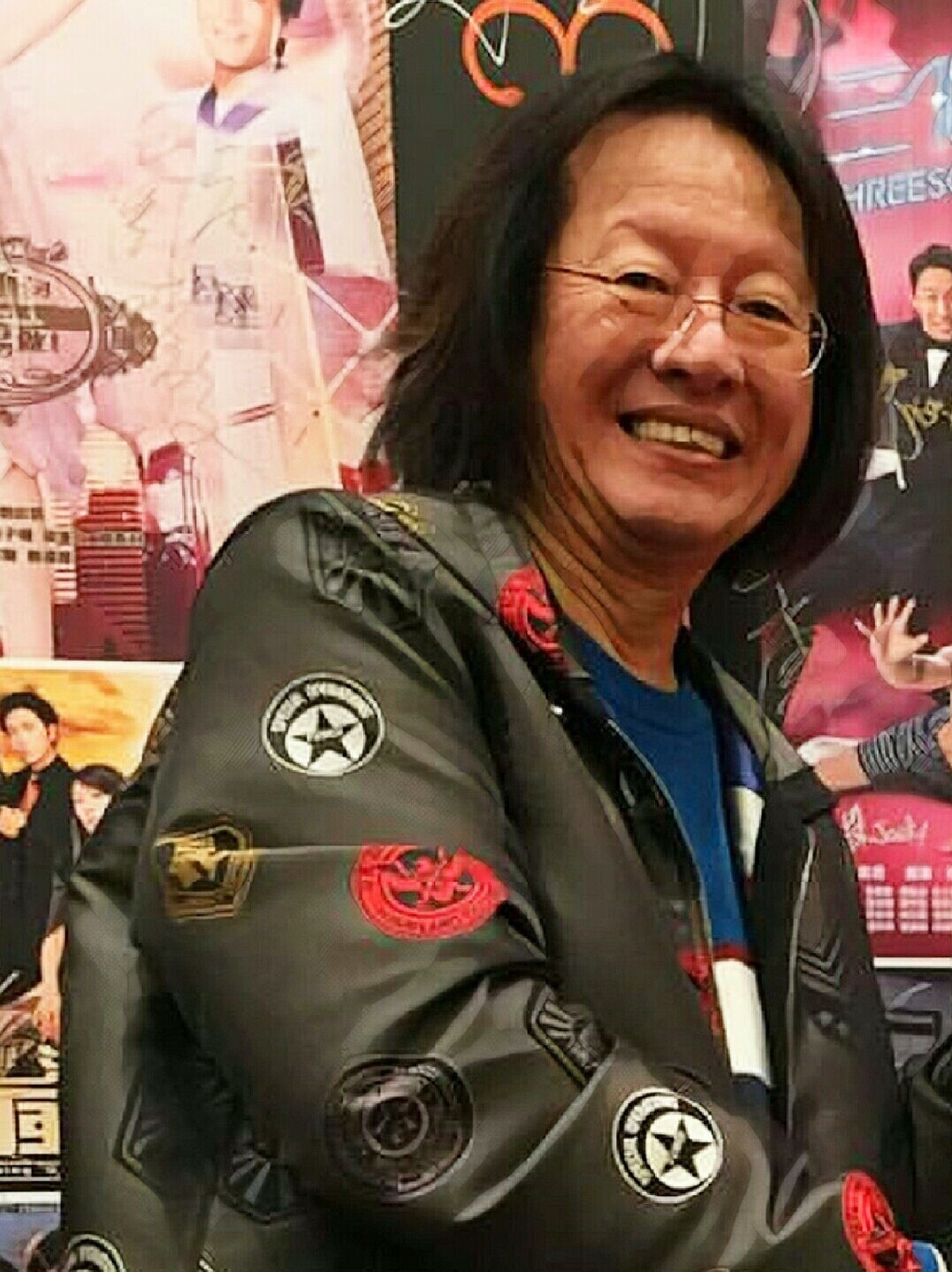 中文（香港）: 潘嘉德70大壽晚宴